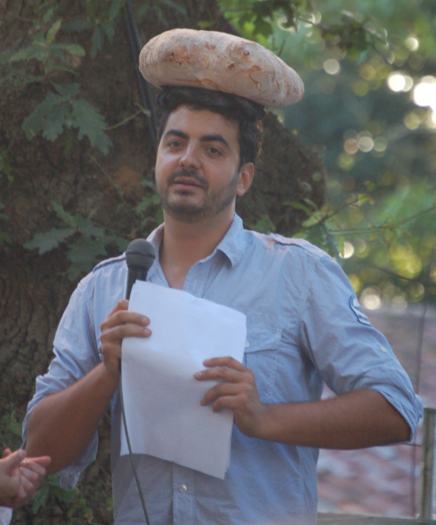 O xornalista Quique Morales no pregón da festa da empanada da Bandeira